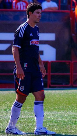 Johnny Magallon